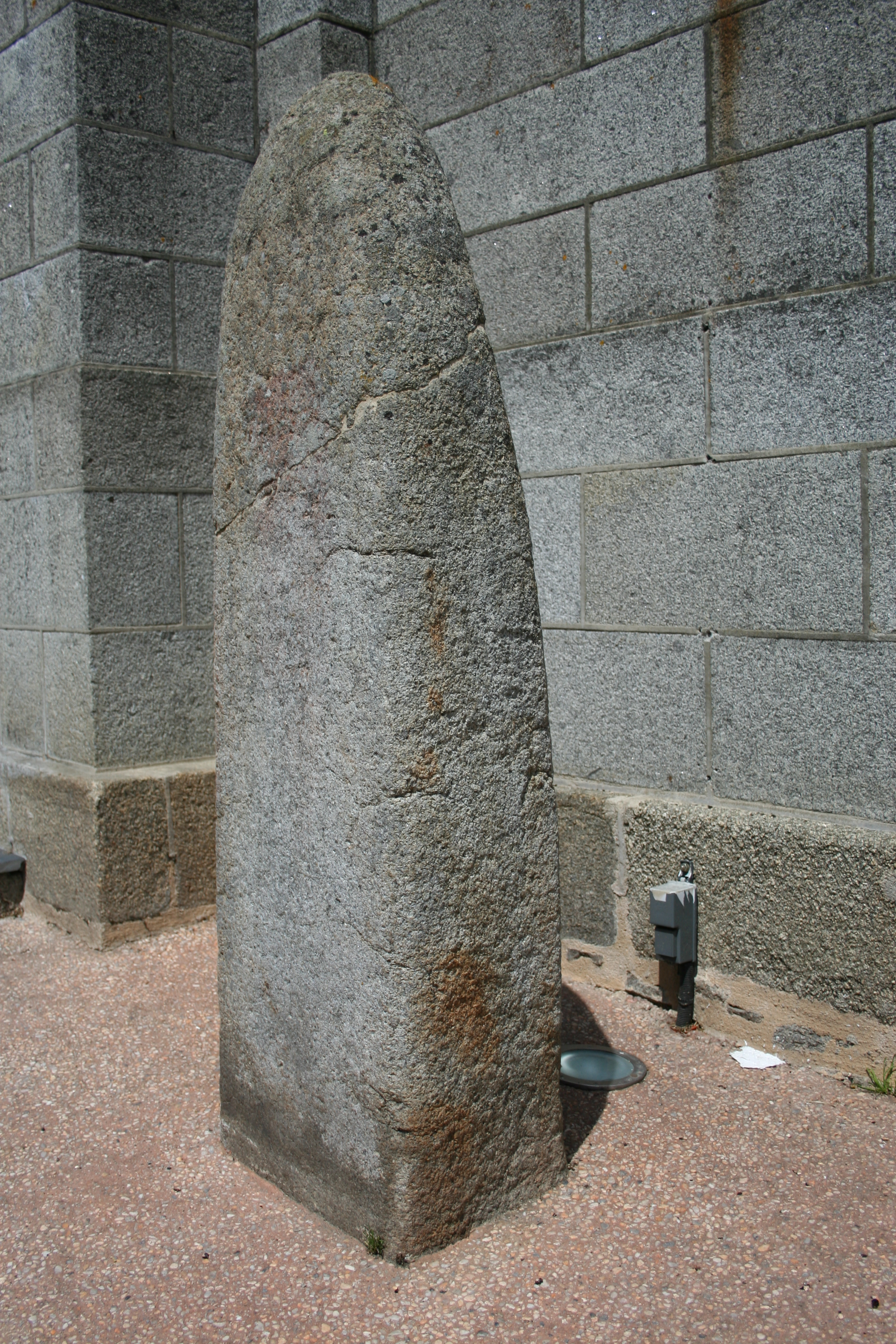 Stèle gauloise à l'entrée de l'église de Jublains, Mayenne